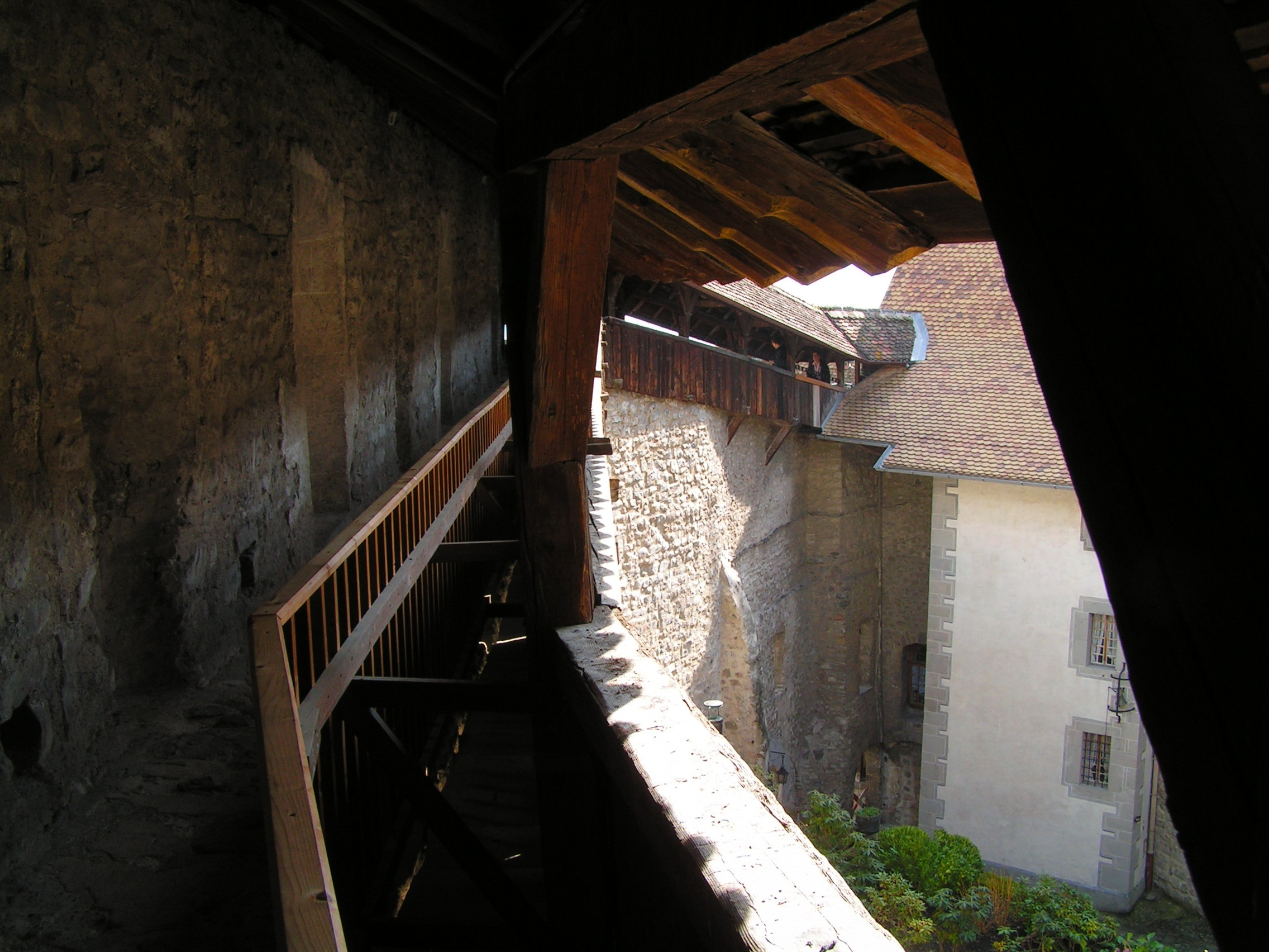 Wehrgang im Schloss Chillon, Veytaux-Montreux, Schweiz